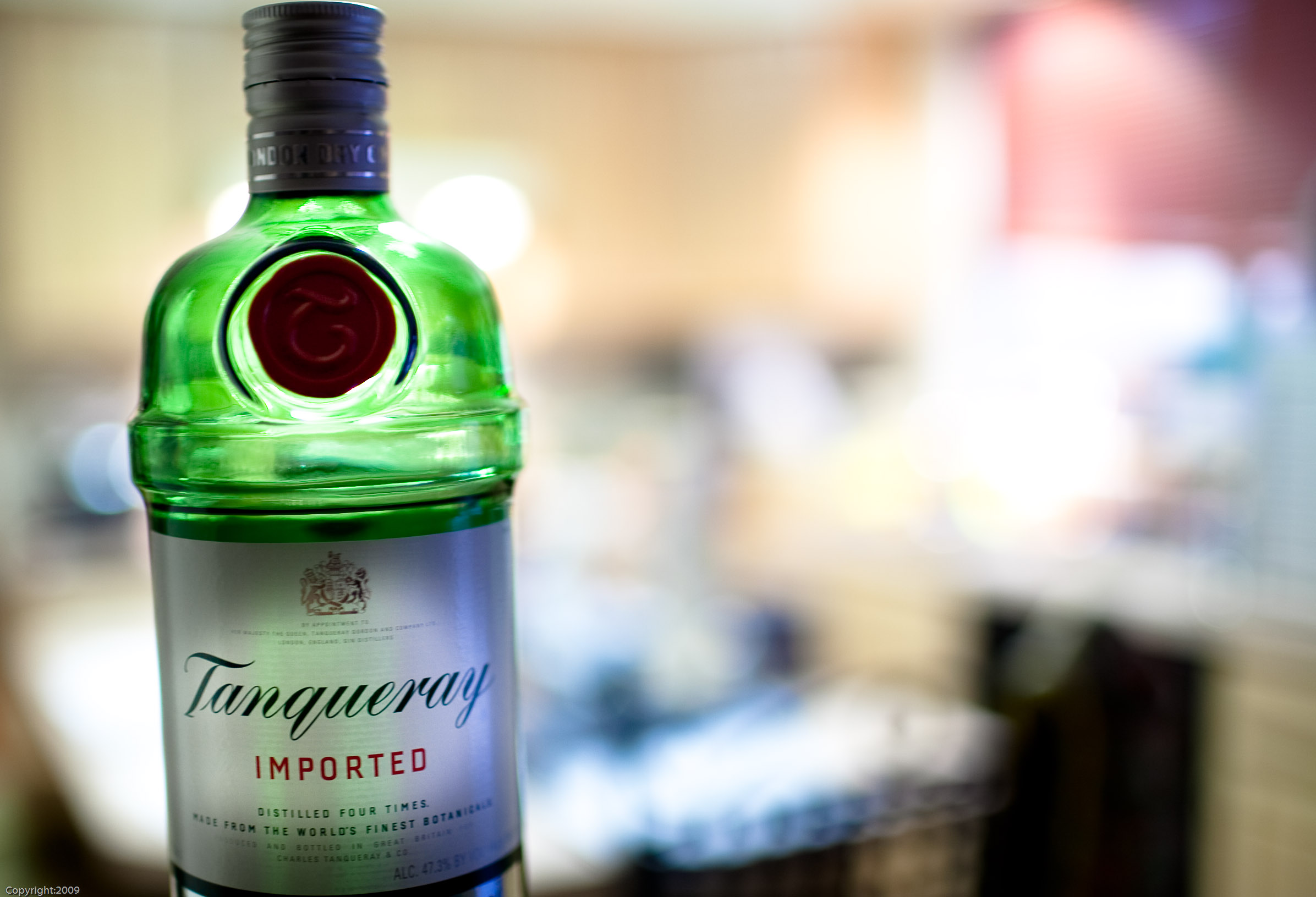 Tanqueray